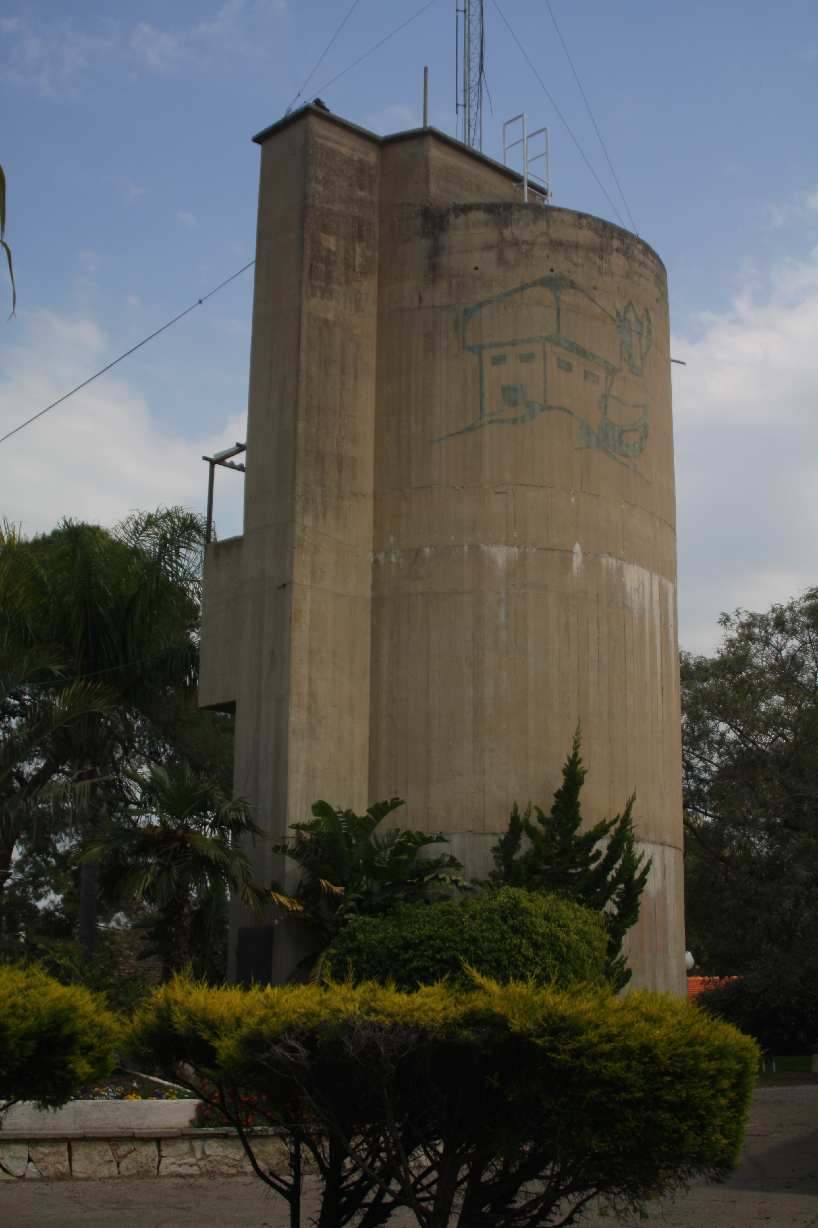 מגדל המים של מענית Ma'anit water tower